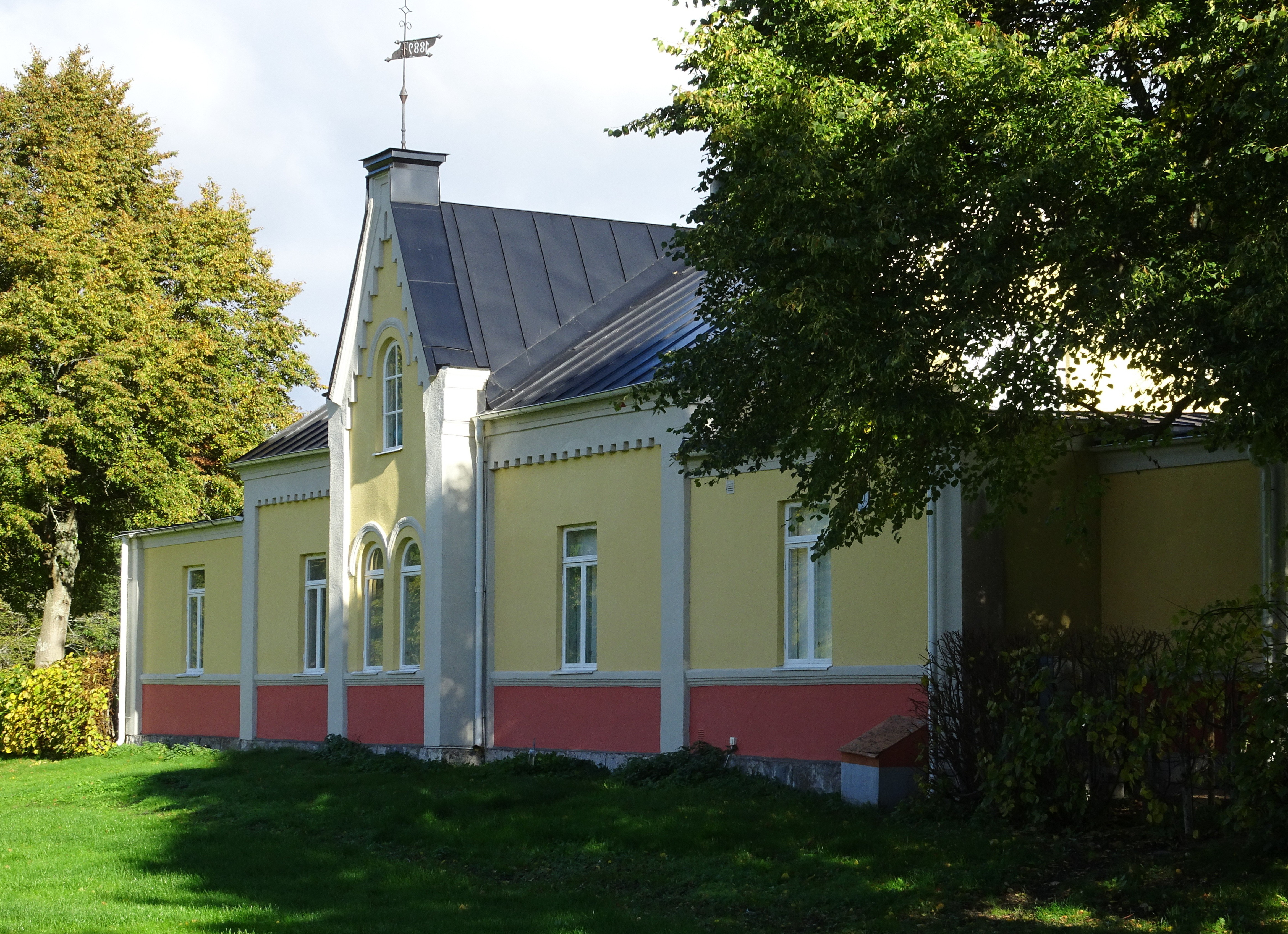 Nynäs gårds förvaltarbostad